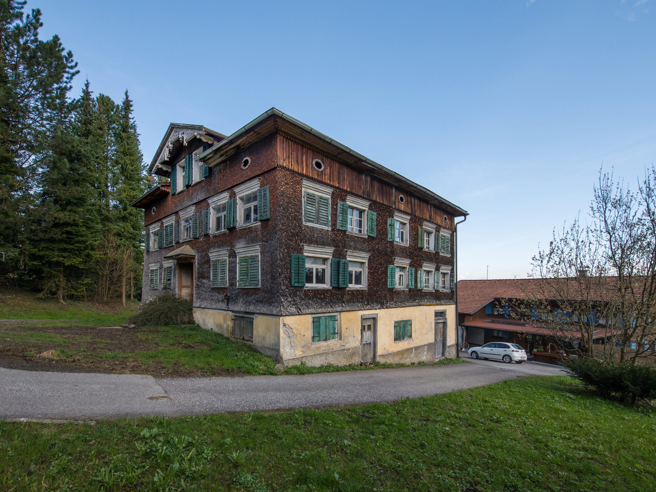 Vermutlich altes Mesnerhaus in Alberschwende Nr.6 im Bregenzerwald. Verschindelter, 5achsiger Würfelbau mit Zwerchgiebel, erbaut 1908.